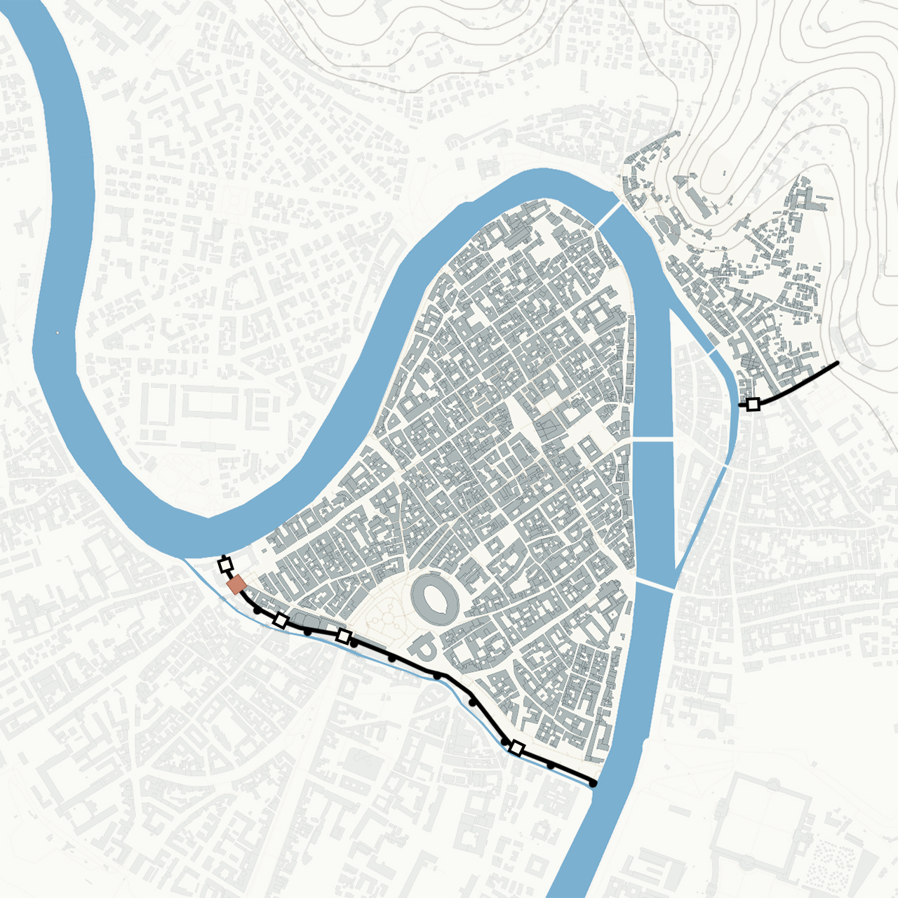 Planimetria della città di Verona con le mura e le porte urbiche principali, in rosso l'arco dei Gavi. Vedi anche Le mura di Verona di Annamaria Conforti Calcagni.